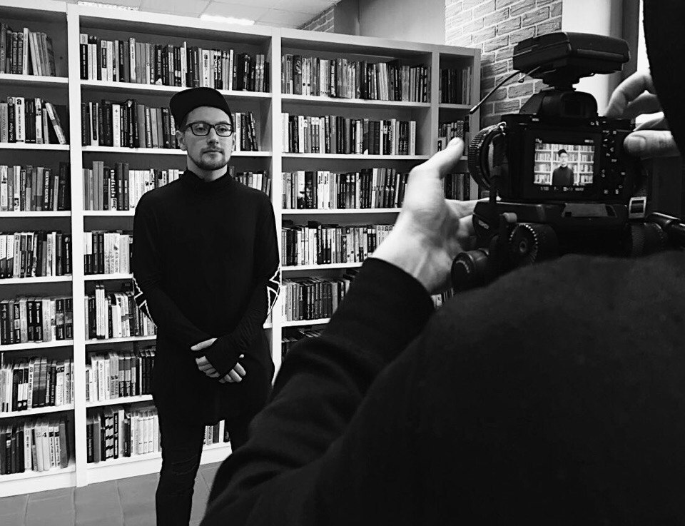 Андрей Орловский дает интервью